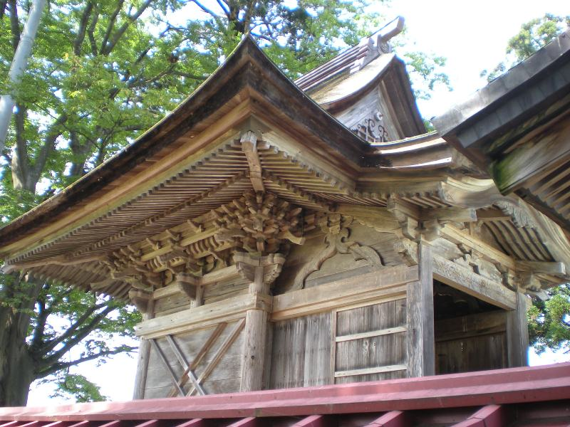 古四王神社の本殿